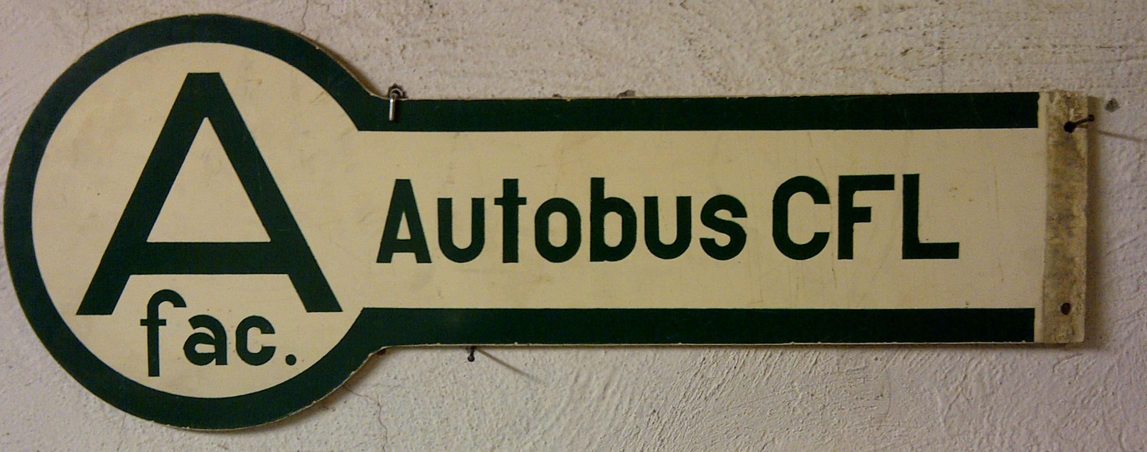 Fréiert Schëld fir e Busarrêt wéi et zu Lëtzebuerg fir d'CFL Bussen am Gebrauch war.